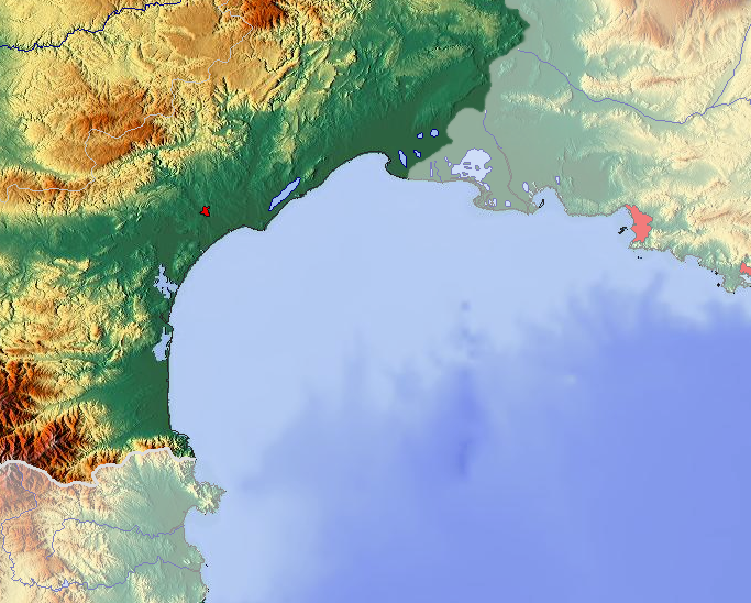 Golfe du Lion, le Grand Sud-Ouest français étant en surbrillance